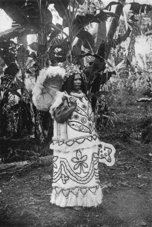 Marquesan chiefess in traditional tapa costume